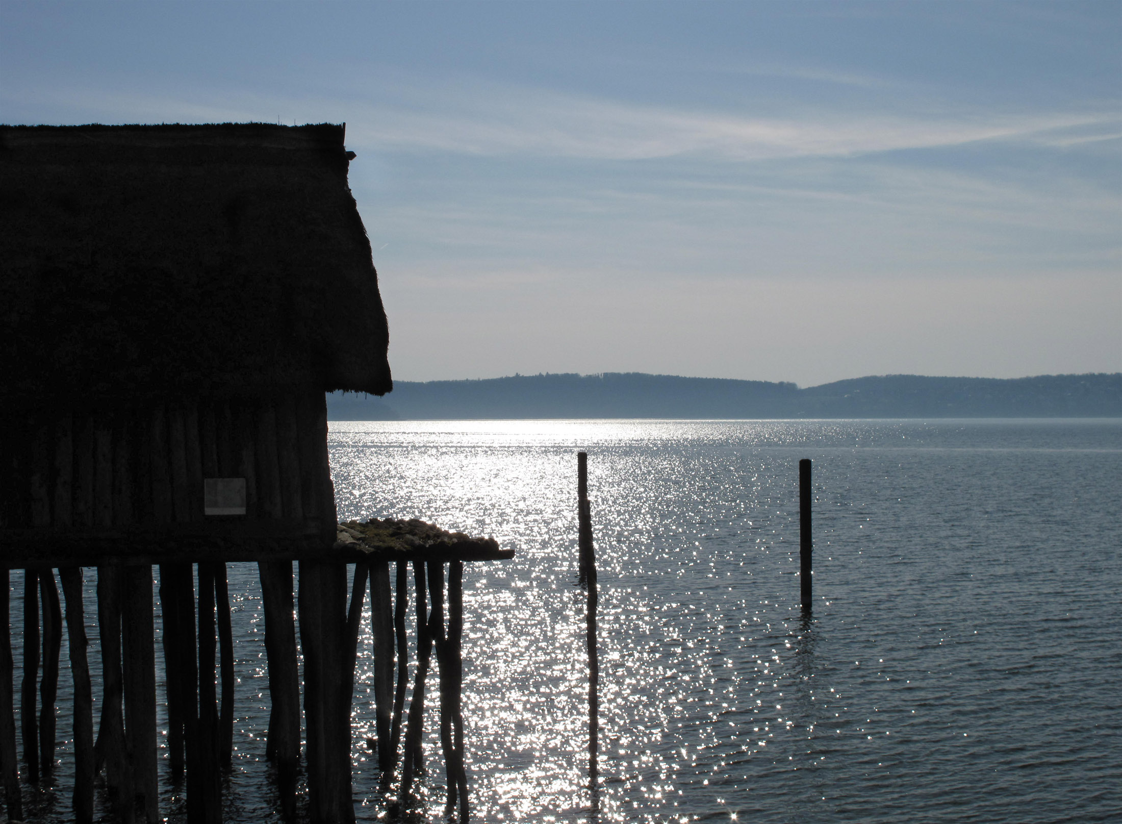 Museo de Palafitos de Uhldingen-Mühlhofen, barrio Unteruhldingen (Lago Constanza, Alemania)